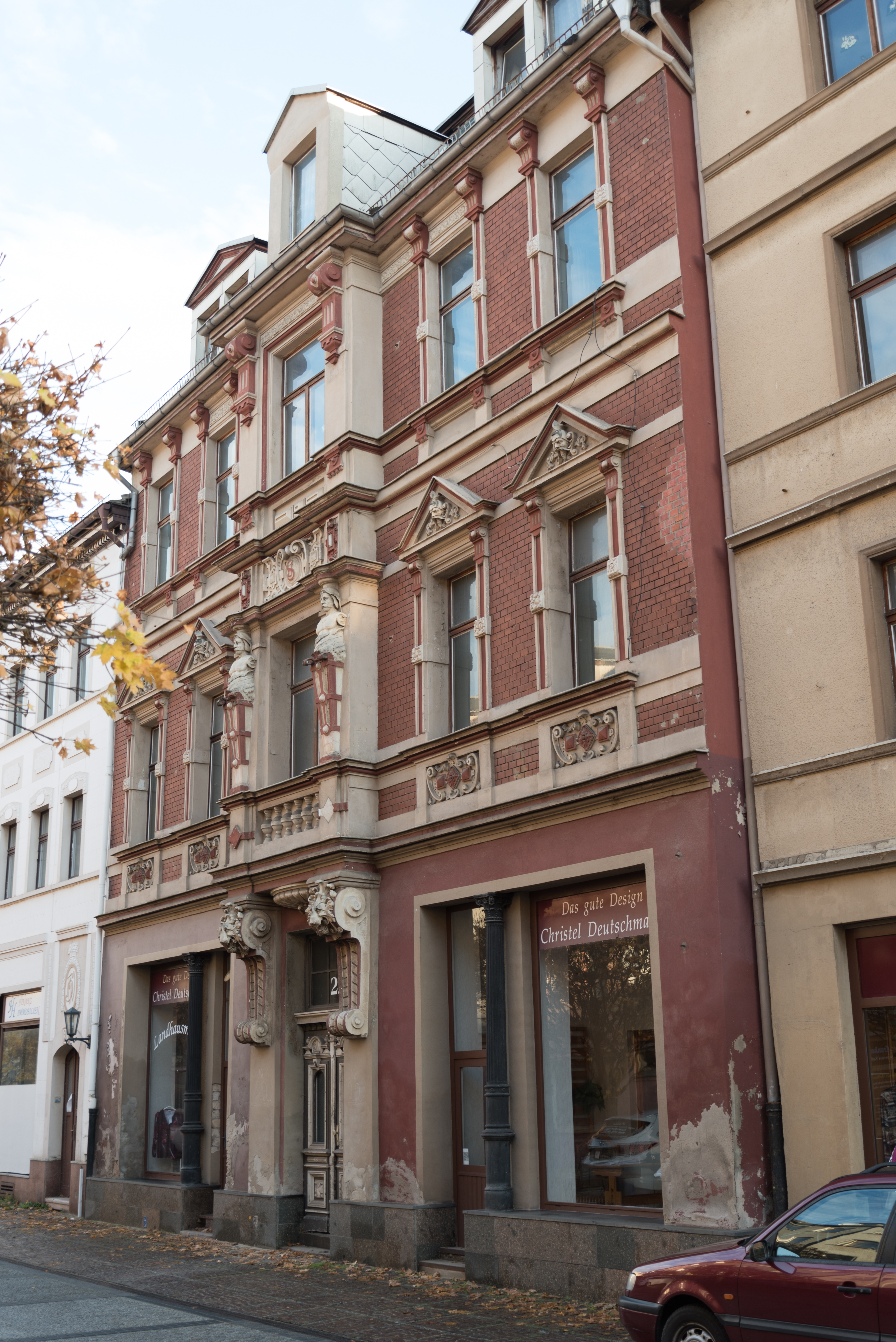 Weißenfels, Nikolaistraße 22